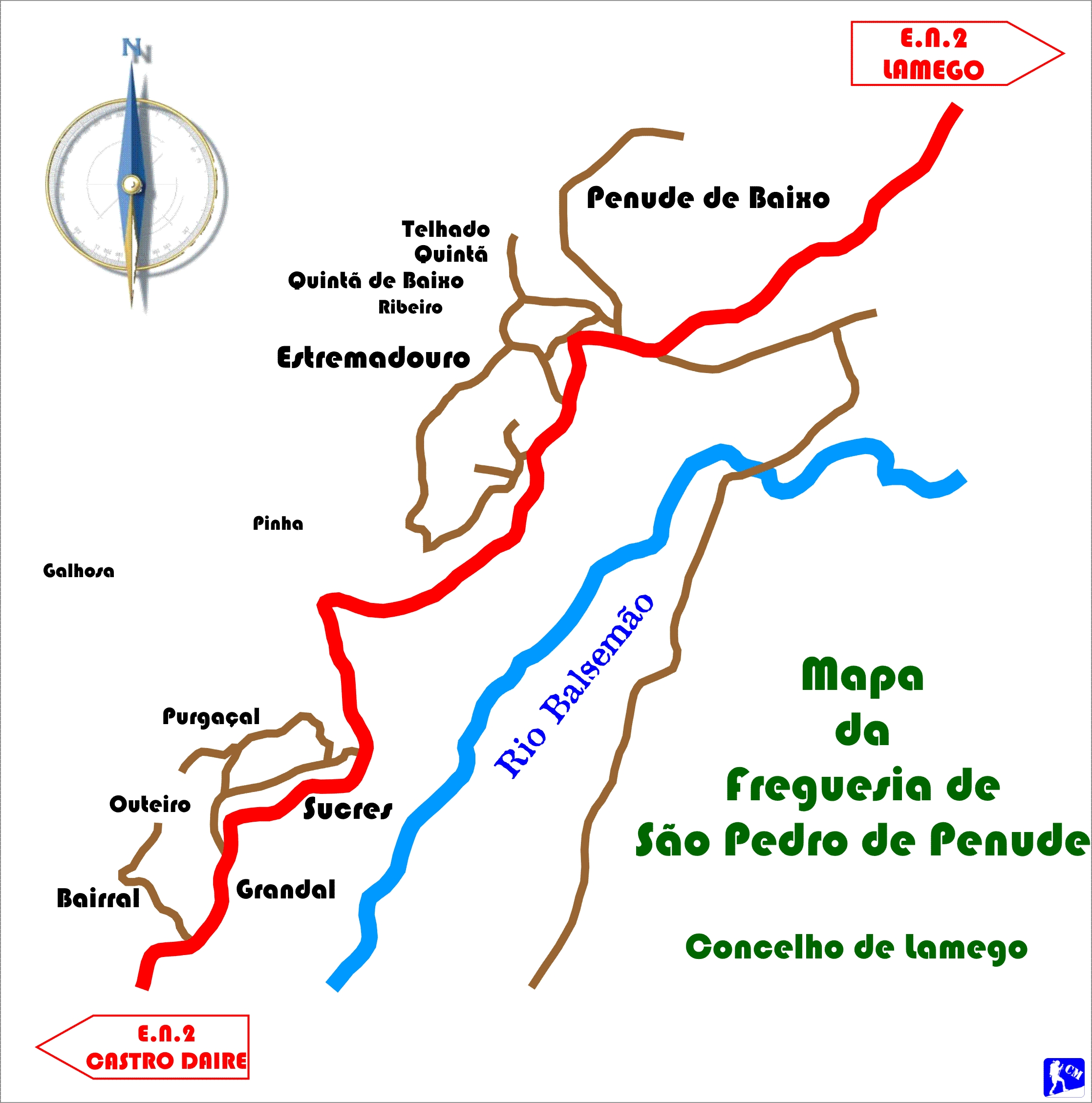 Map of Freguesia de Penude, Concelho de Lamego